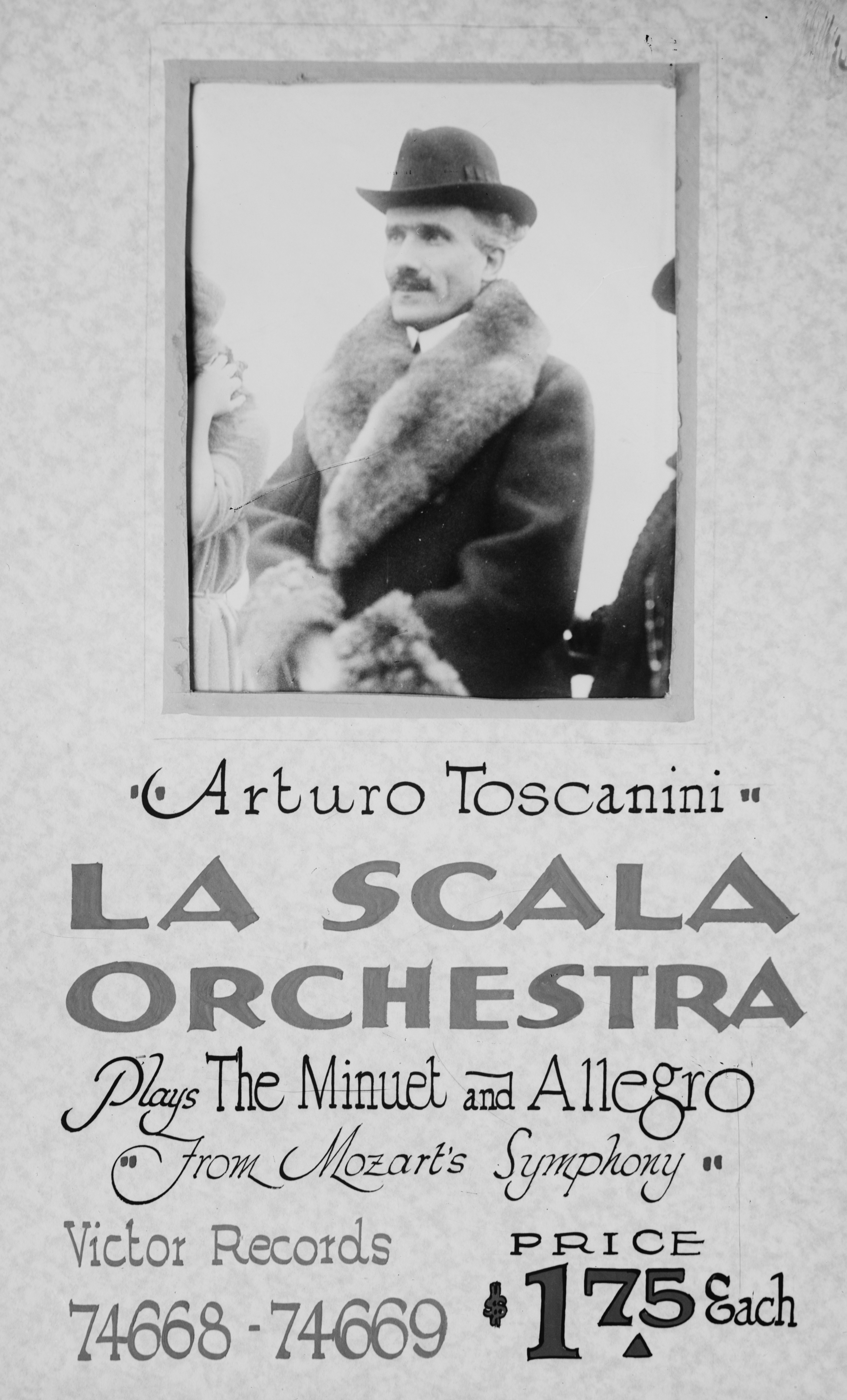 Toscaninni poster